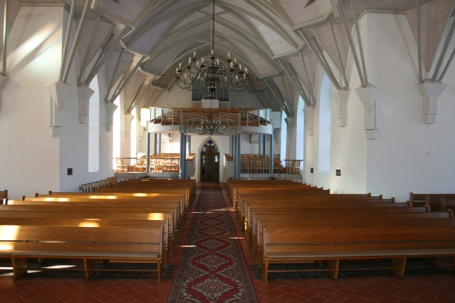 Kirche in Kambja